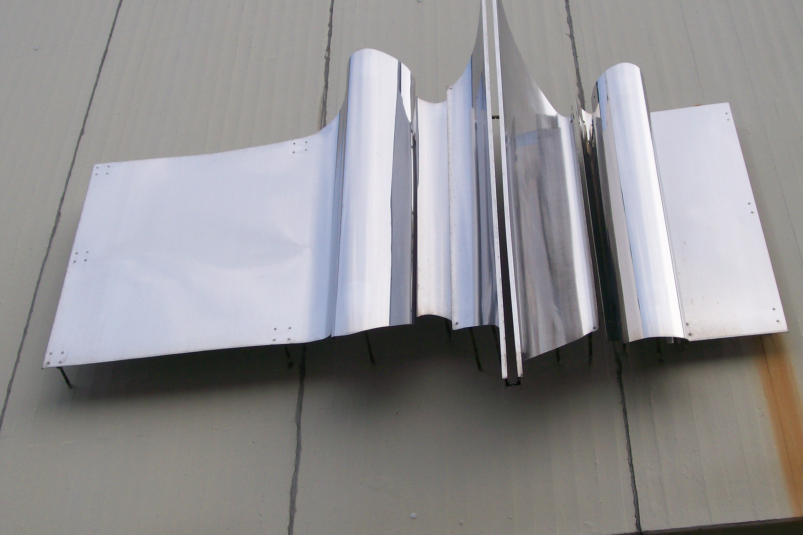 Wandrelief von Günter Ferdinand Ris (1928-2005) von 1970 am Haus für alle, Jugend und Freizeitheim “Moislinger Mitte” in Lübeck-Moisling. Das Relief aus Edelstahl wurde durch die Possehl-Stiftung gefördert.